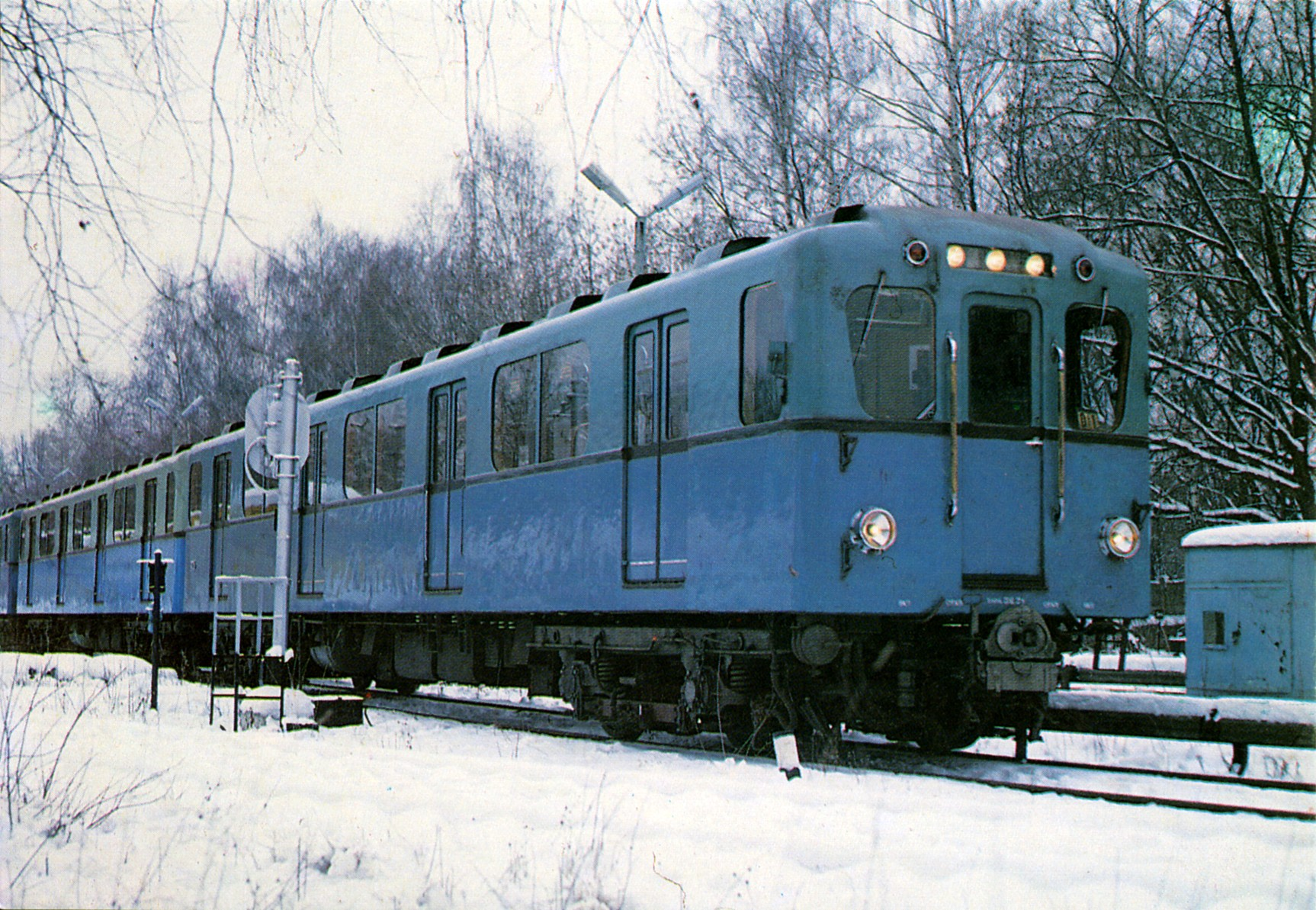 Метровагон типа Д